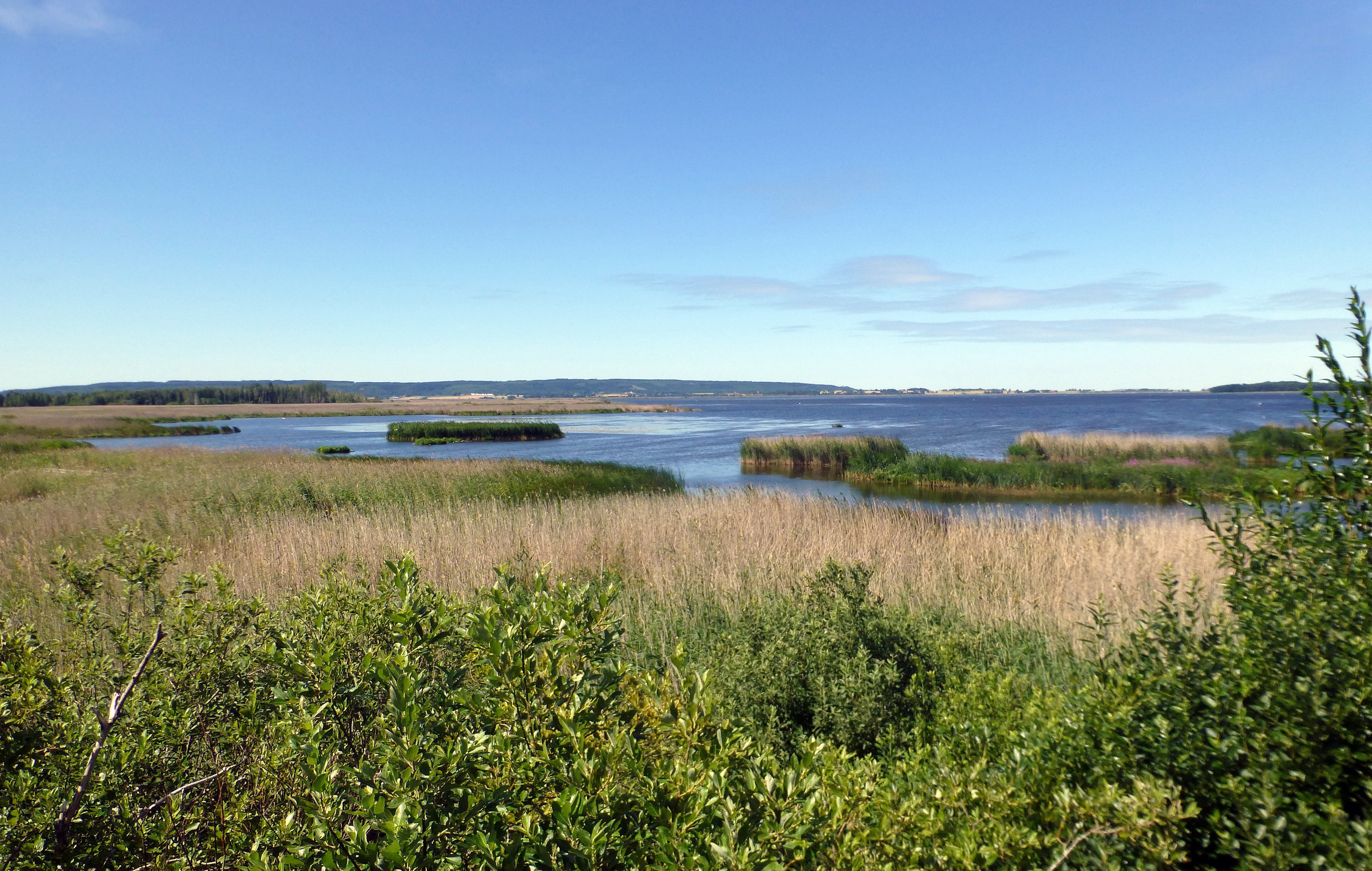 Tåkern set mod nordvest fra sydbredden